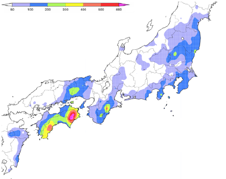 艾涛在日本所造成之降雨图